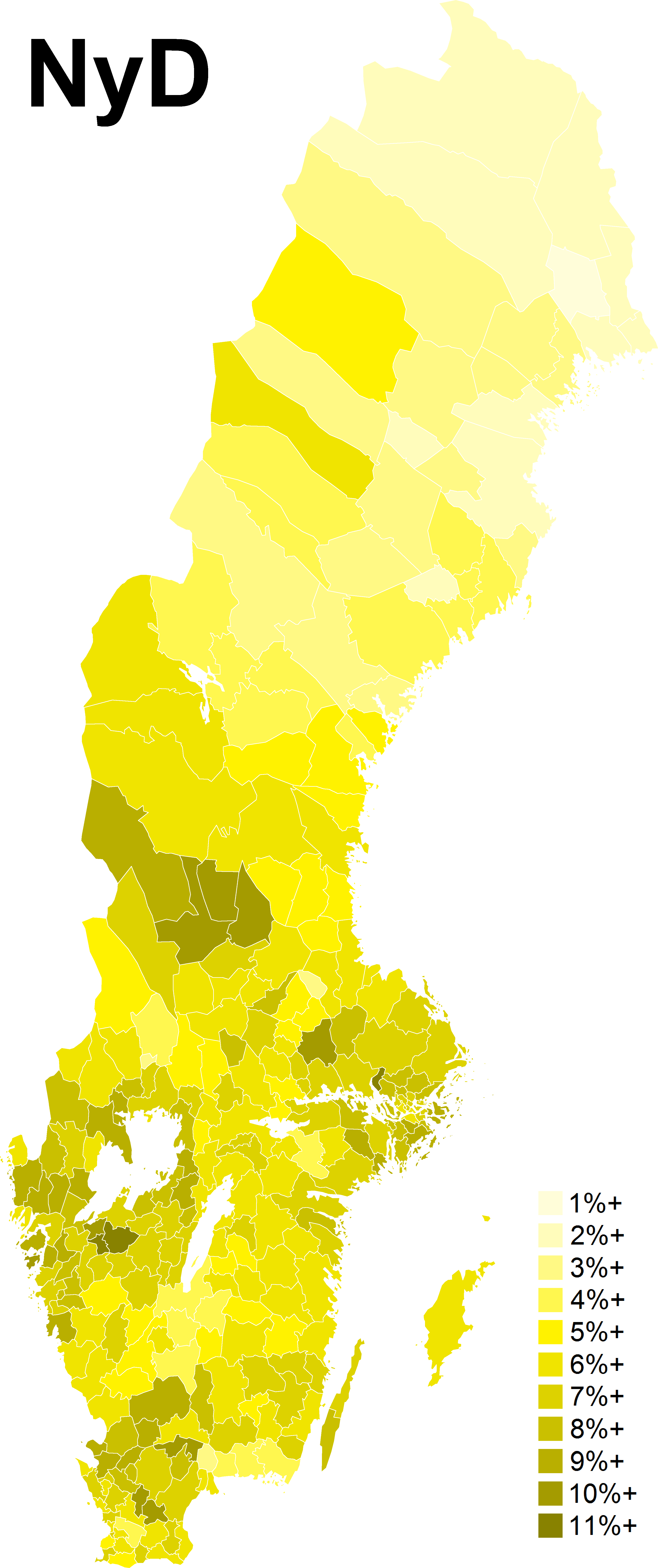 Resultat från riksdagsvalet i Sverige 1991 för Ny demokrati efter kommun.